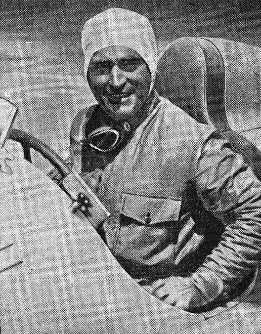 Luigi Fagioli, vainqueur de l'Avusrennen 1935.